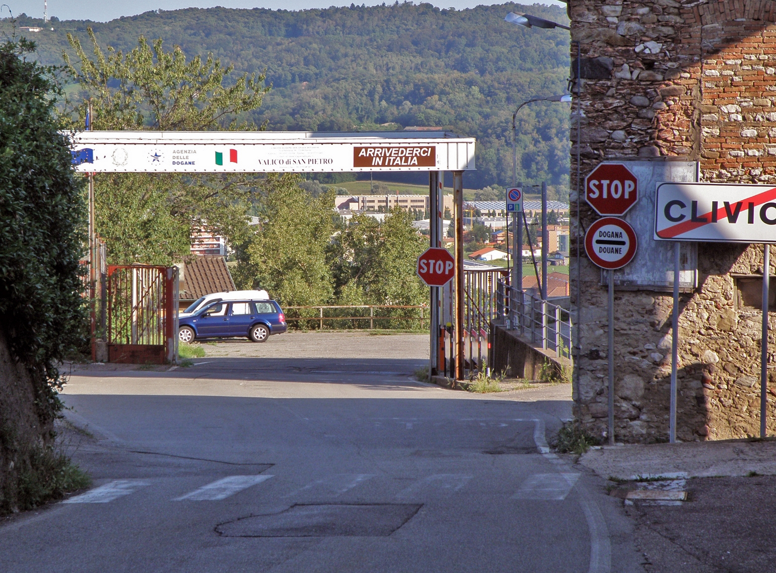 Valico doganale di confine tra Italia e Svizzera. San Pietro di Clivio (Varese)